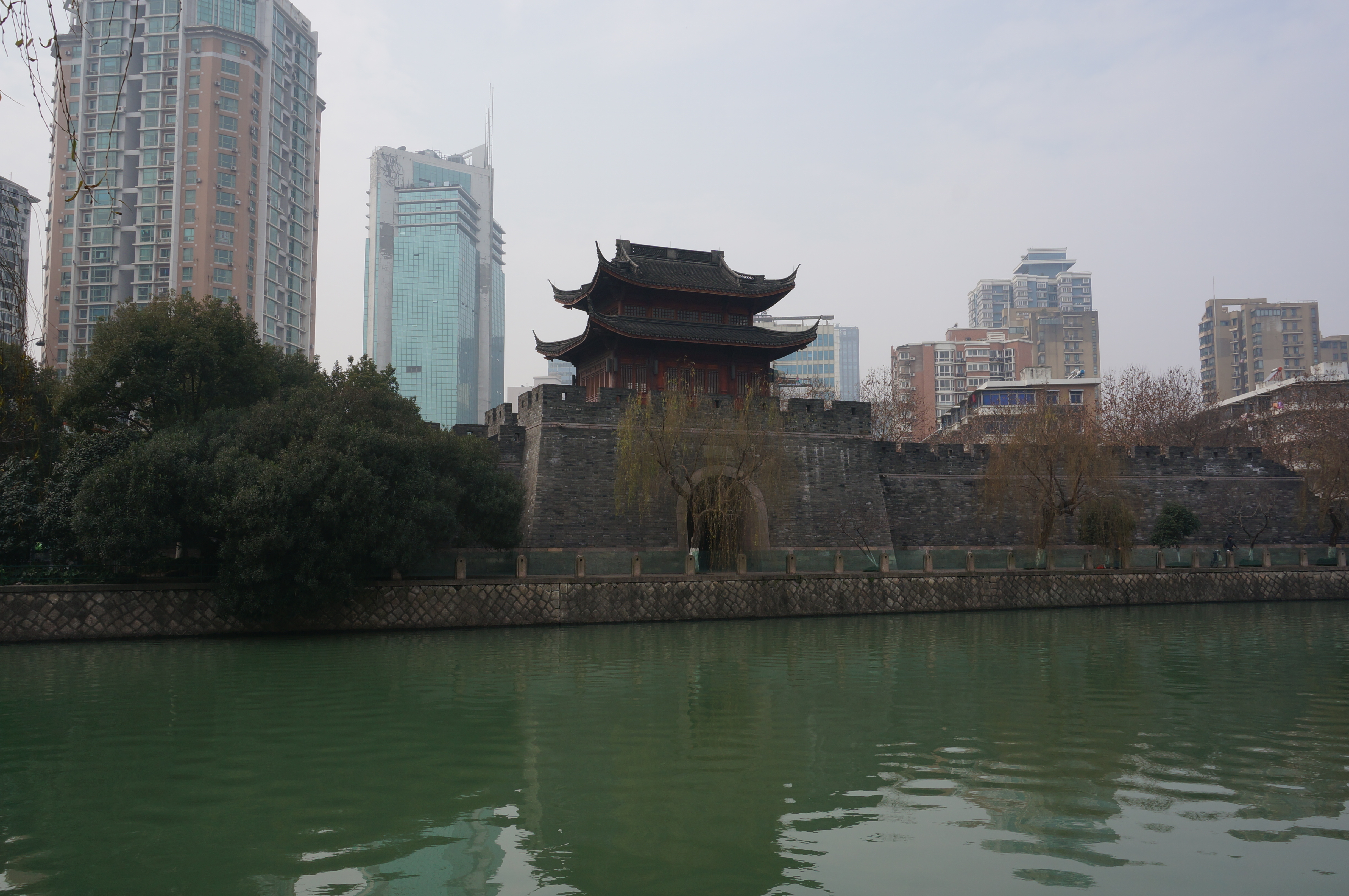 杭州庆春门（重建，今杭州古城墙陈列馆），自东侧贴沙河对面看。